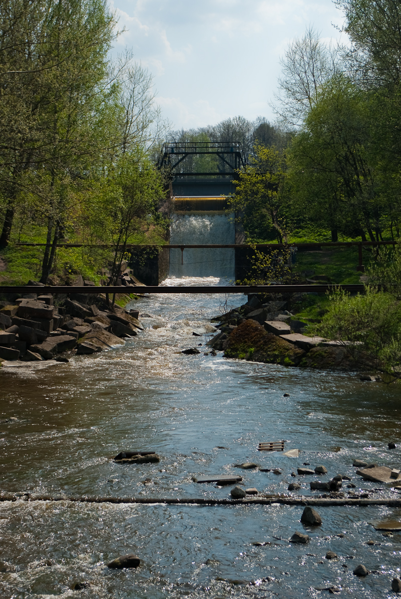 Мост-водоспуск на реке Стрелка